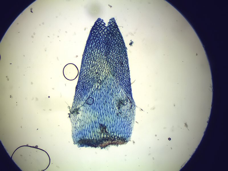 Mittleres Torfmoos (Sphagnum magellanicum), Stammblatt, Vergrößerung: 40x